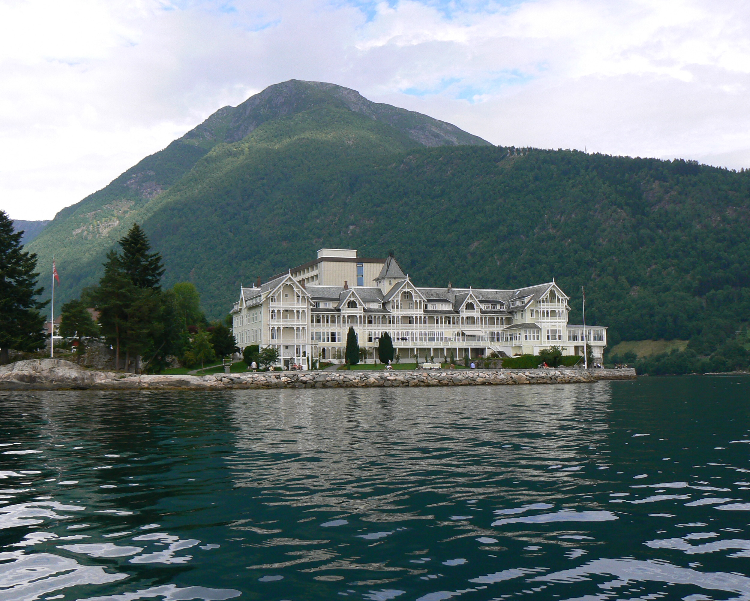 Kviknes Hotel på Holmen i Balestrand